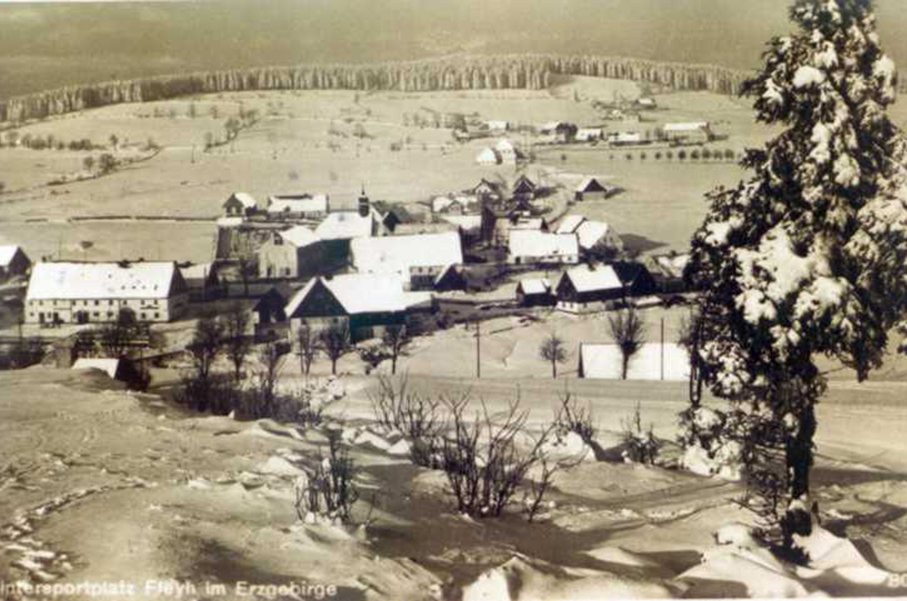 Ehemaliges Dorf Fláje (Fleyh) in Tschechien.